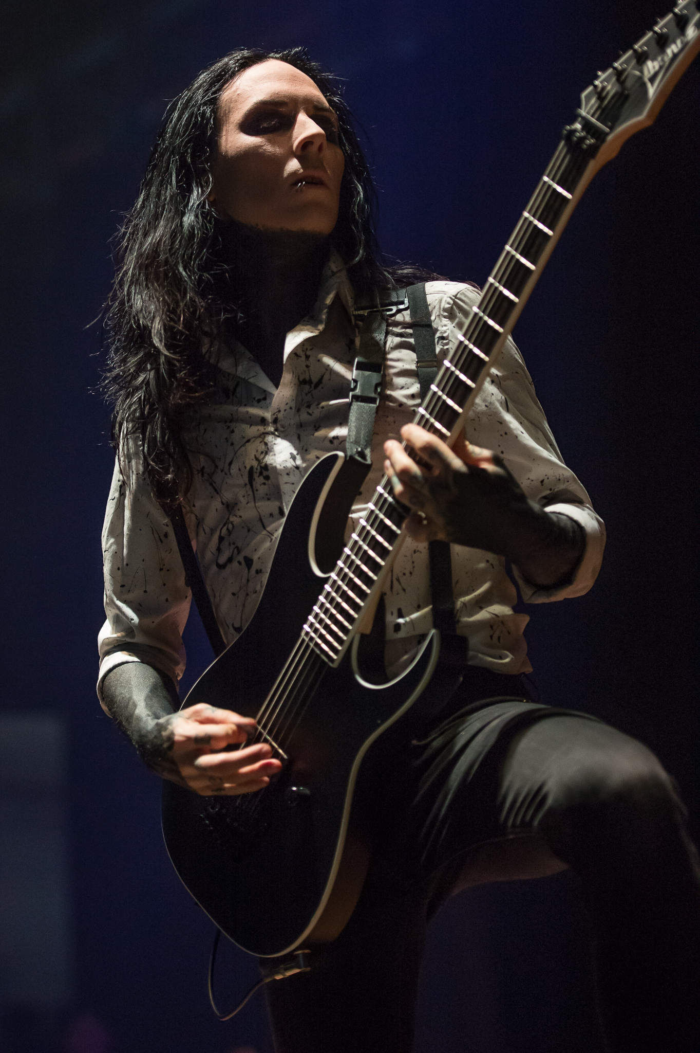 ARGO-Konzerte,Engelbert Strauss Alternarena,Konzert,Livekonzert,Livemusik,Motionless in White,Musik,RiP,Ricky „Horror“ Olson,Rock im Park 2017